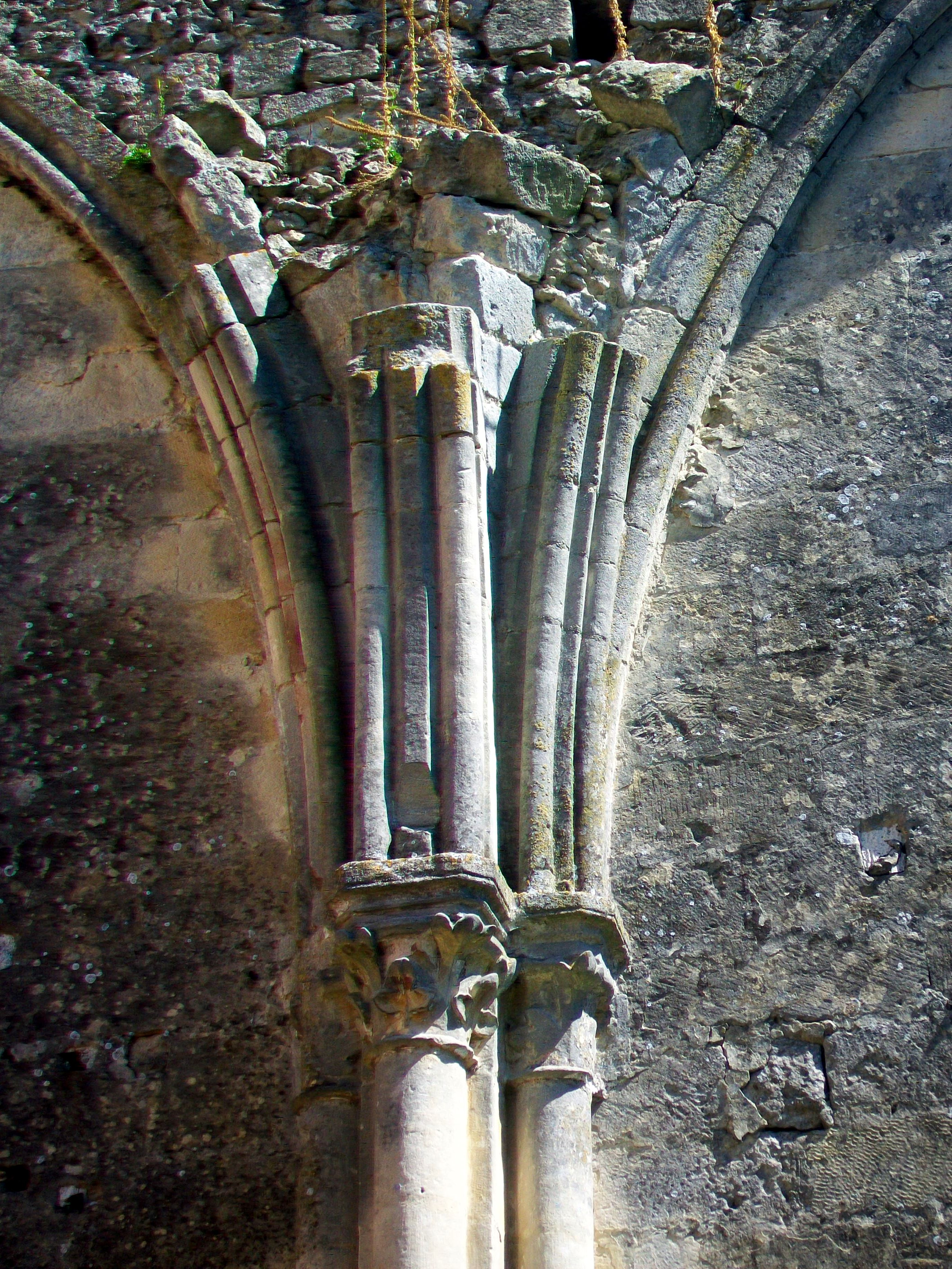 Vestiges des nervures des voûtes, chapiteaux et colonnes engagées, entre la première et la deuxième travée de la grande chapelle latérale du chœur.